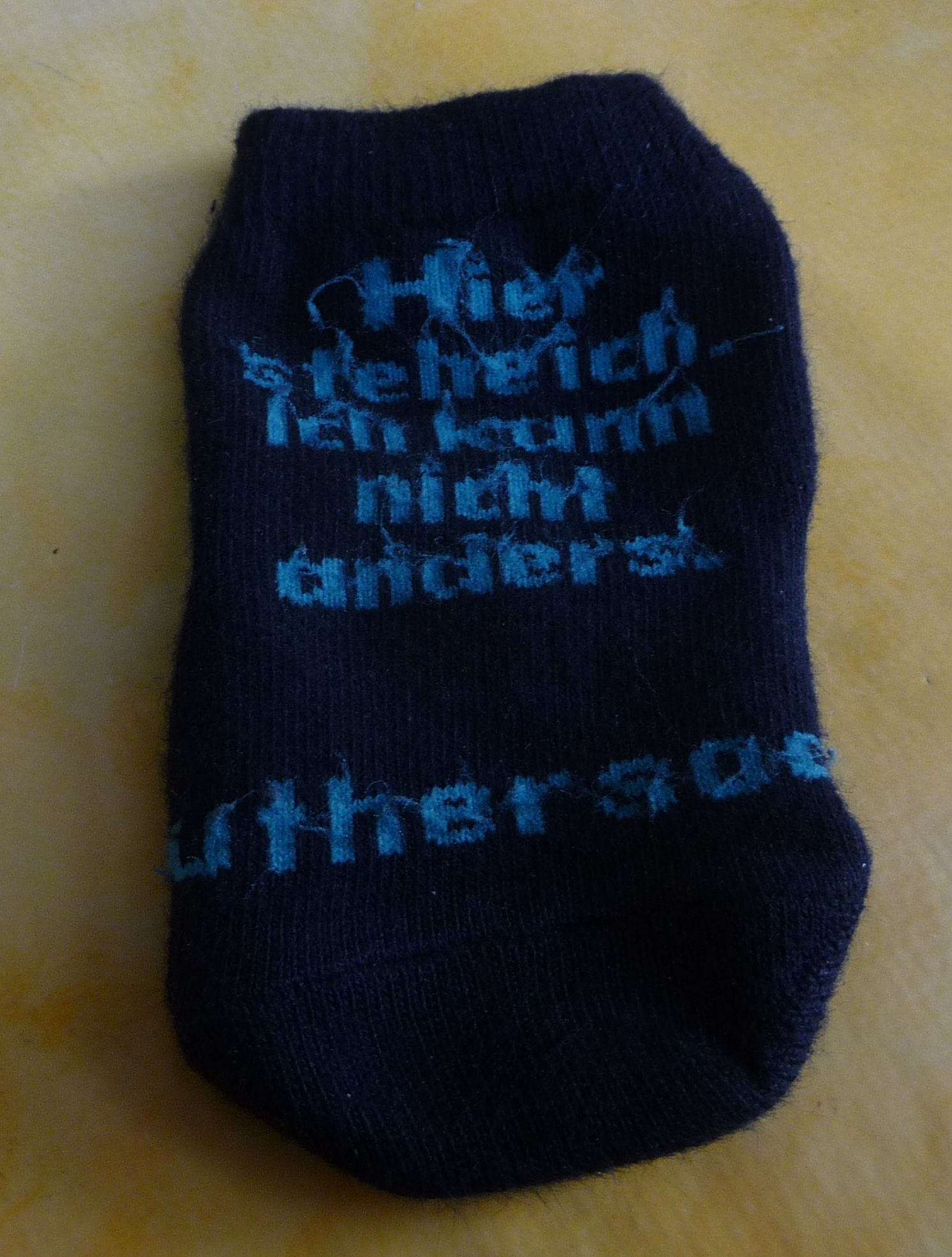 Luthersocke